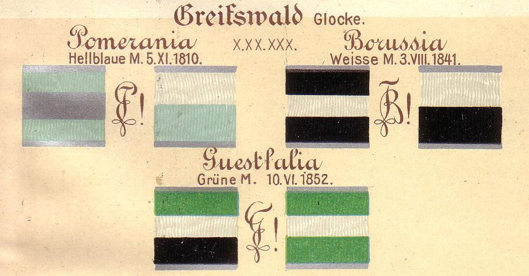 Couleur der Kösener Corps in Greifswald